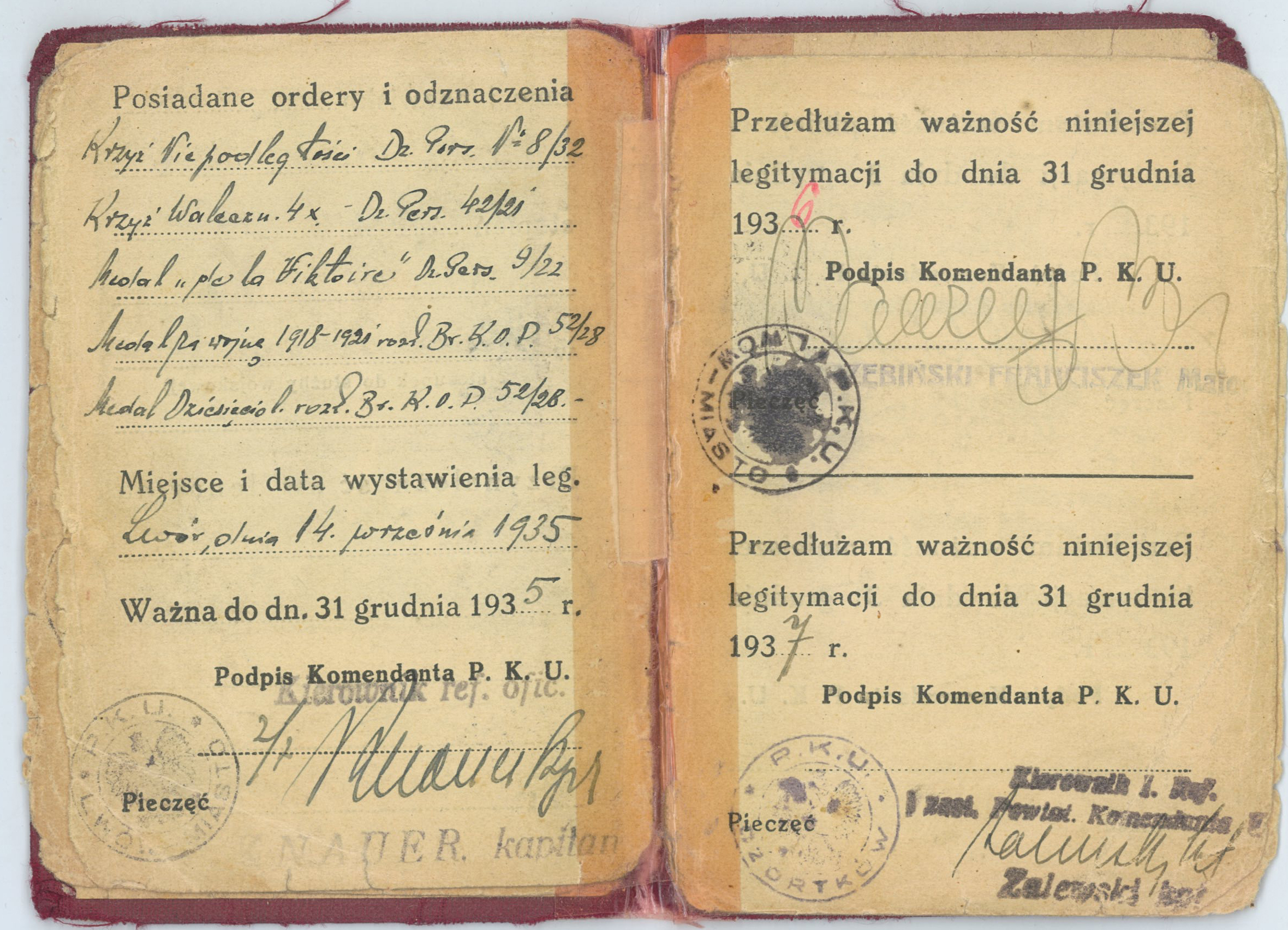 Strona z legitymacji wojskowej Mariana Czajkowskiego z wymienionymi odznaczeniami.